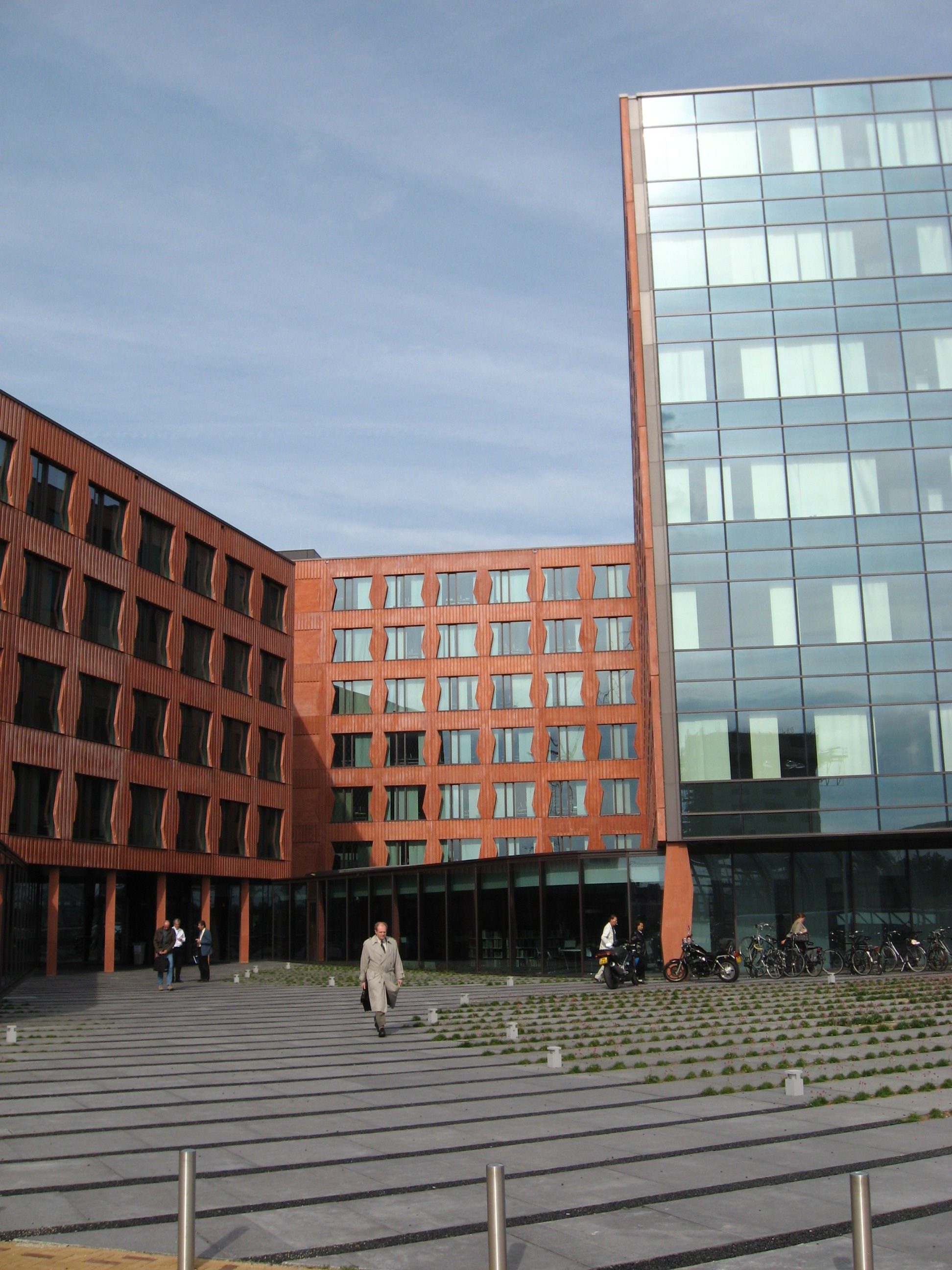 Het nieuwe kantoor van de CBS(Centraal Bureau voor de statistiek) in Leidschenveen dicht bij de Randstadrail halte. Architect Casper Schwarz. Opgeleverd op 20-07-2008